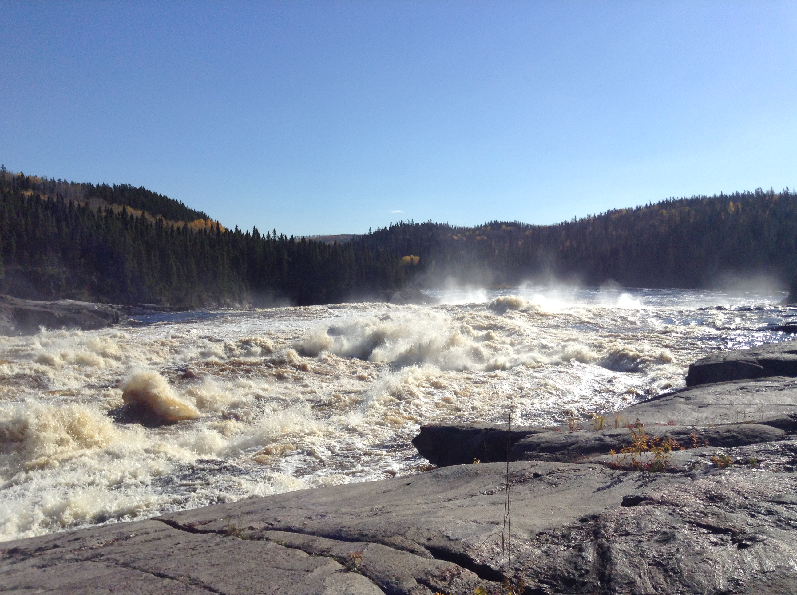 Les chutes Chaudière à l'automne